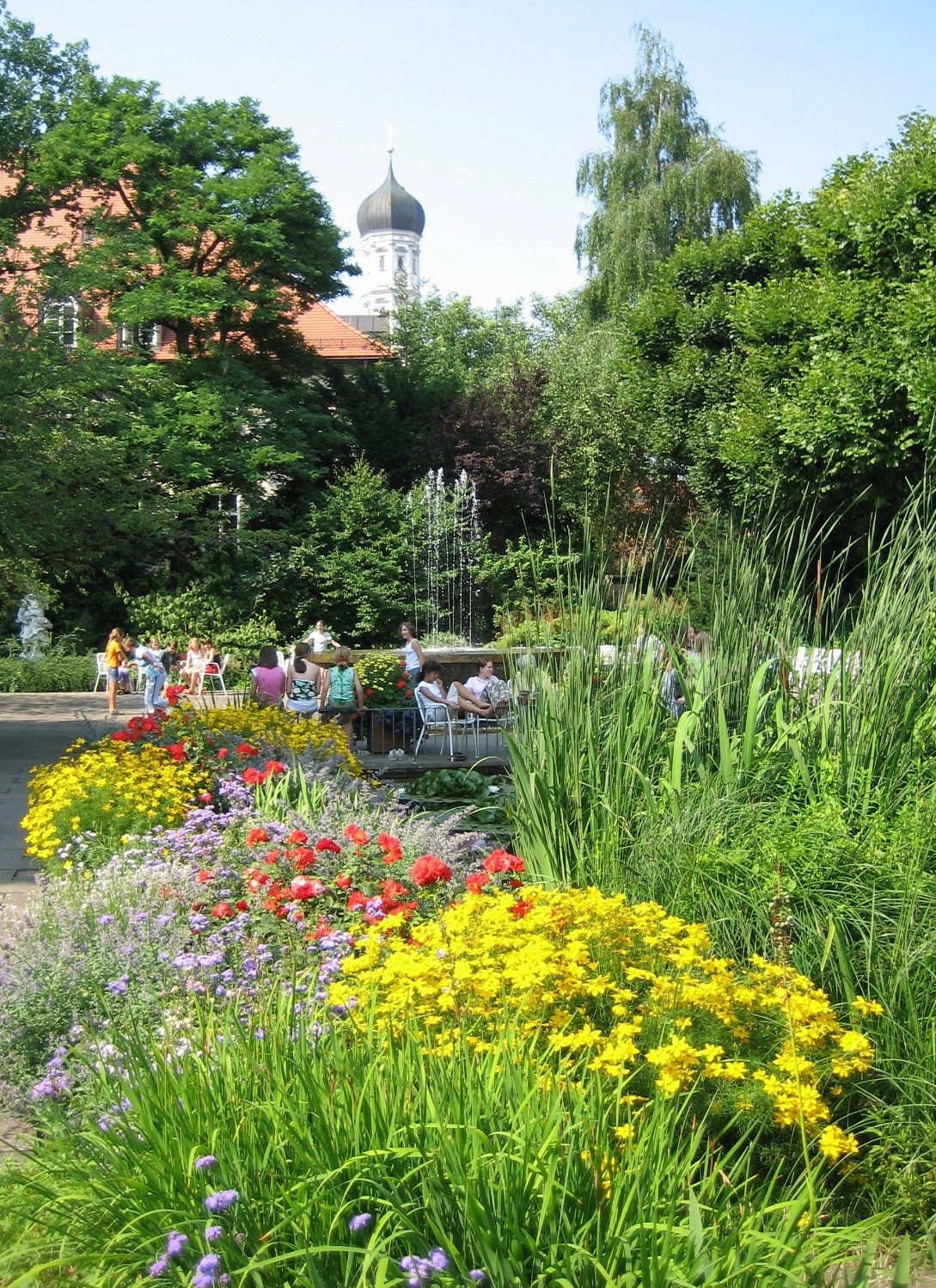 Hofgarten in Augsburg, Blick nach Westen